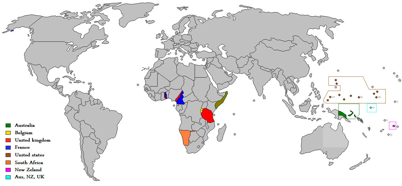 Mapa poručenských území OSN